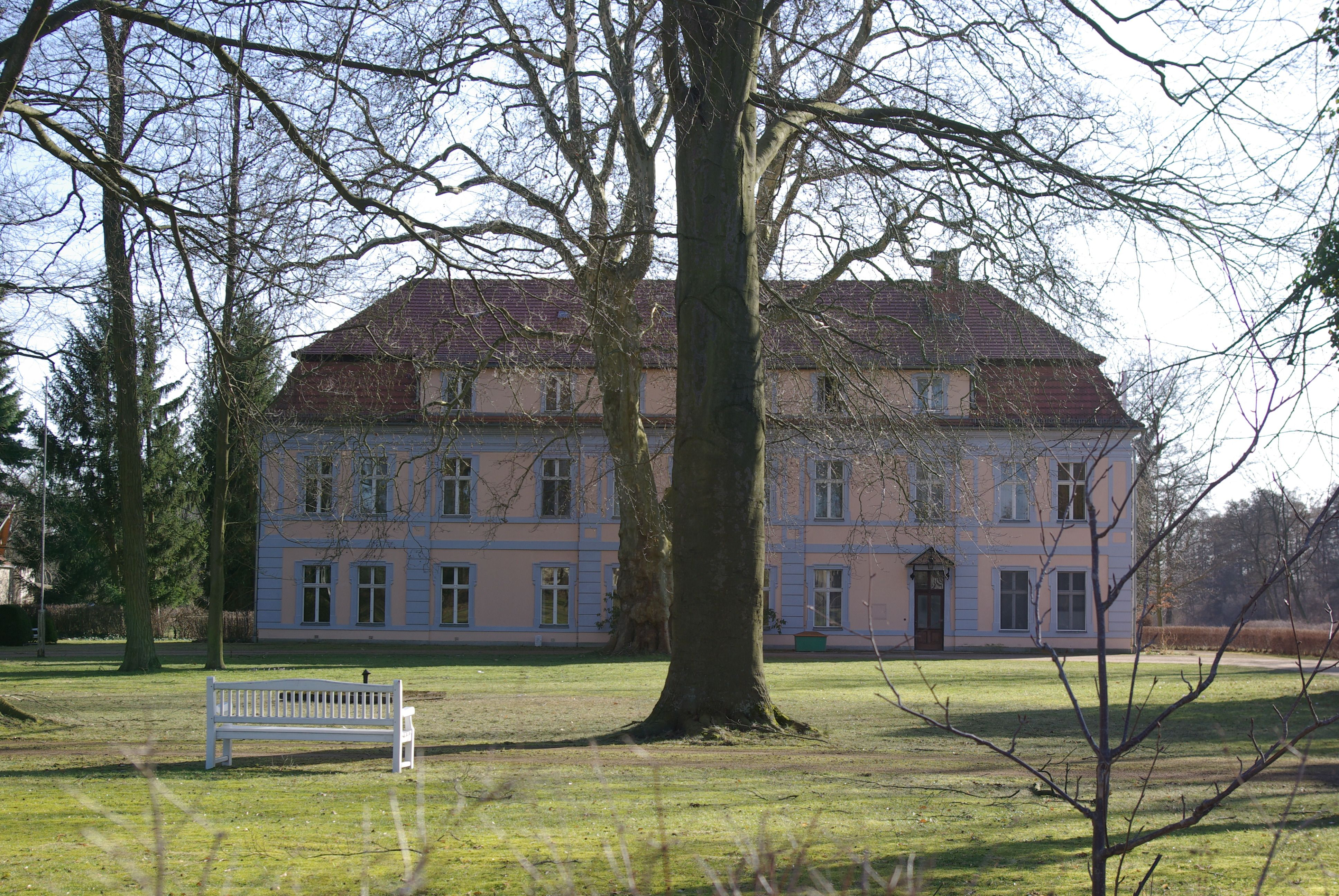 Blossin in der Gemeinde Heidesee in Brandenburg. Das Gutshaus steht unter Denkmalschutz.